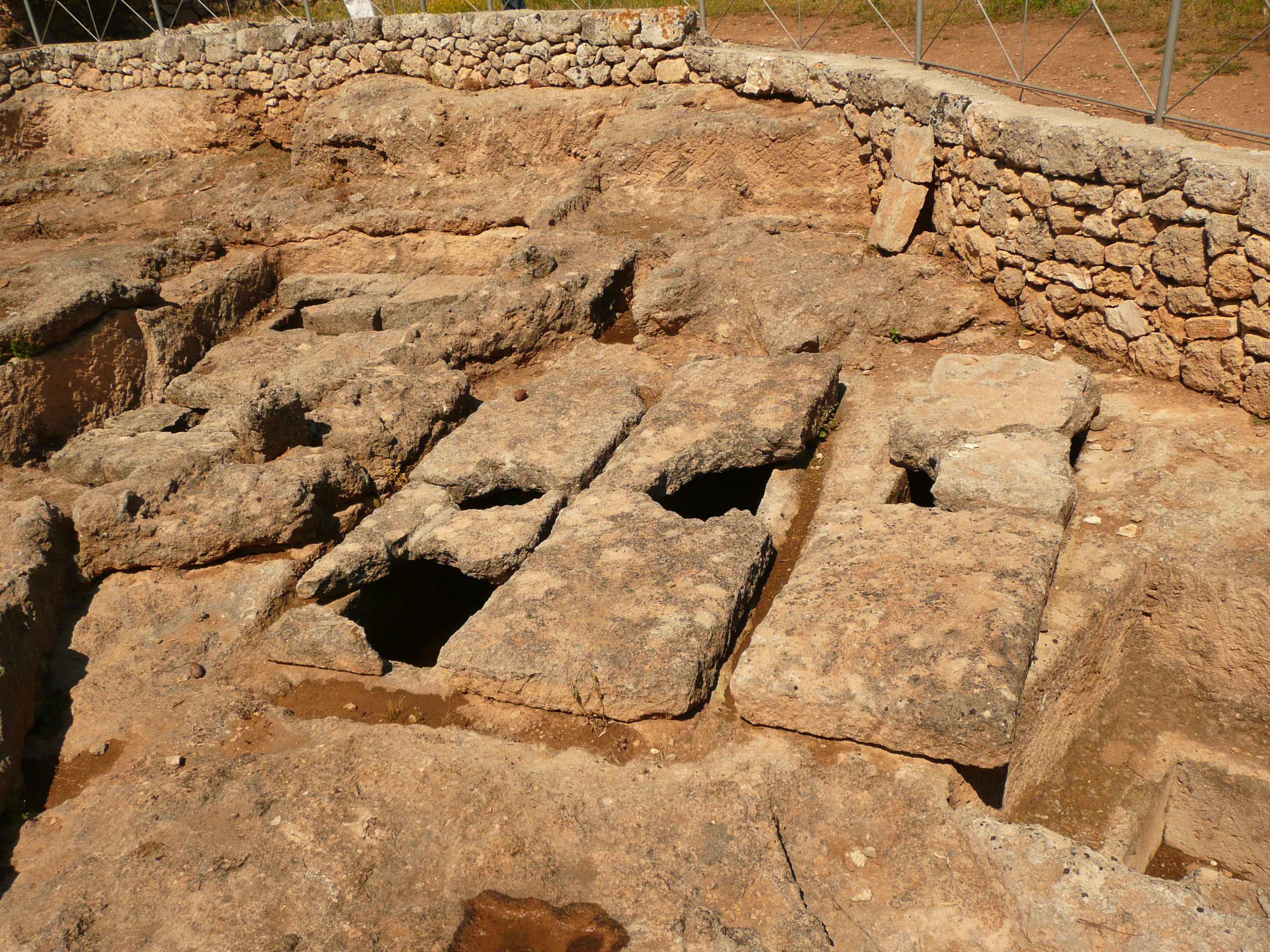 Parque arqueológico de Egnazia, Apulia.